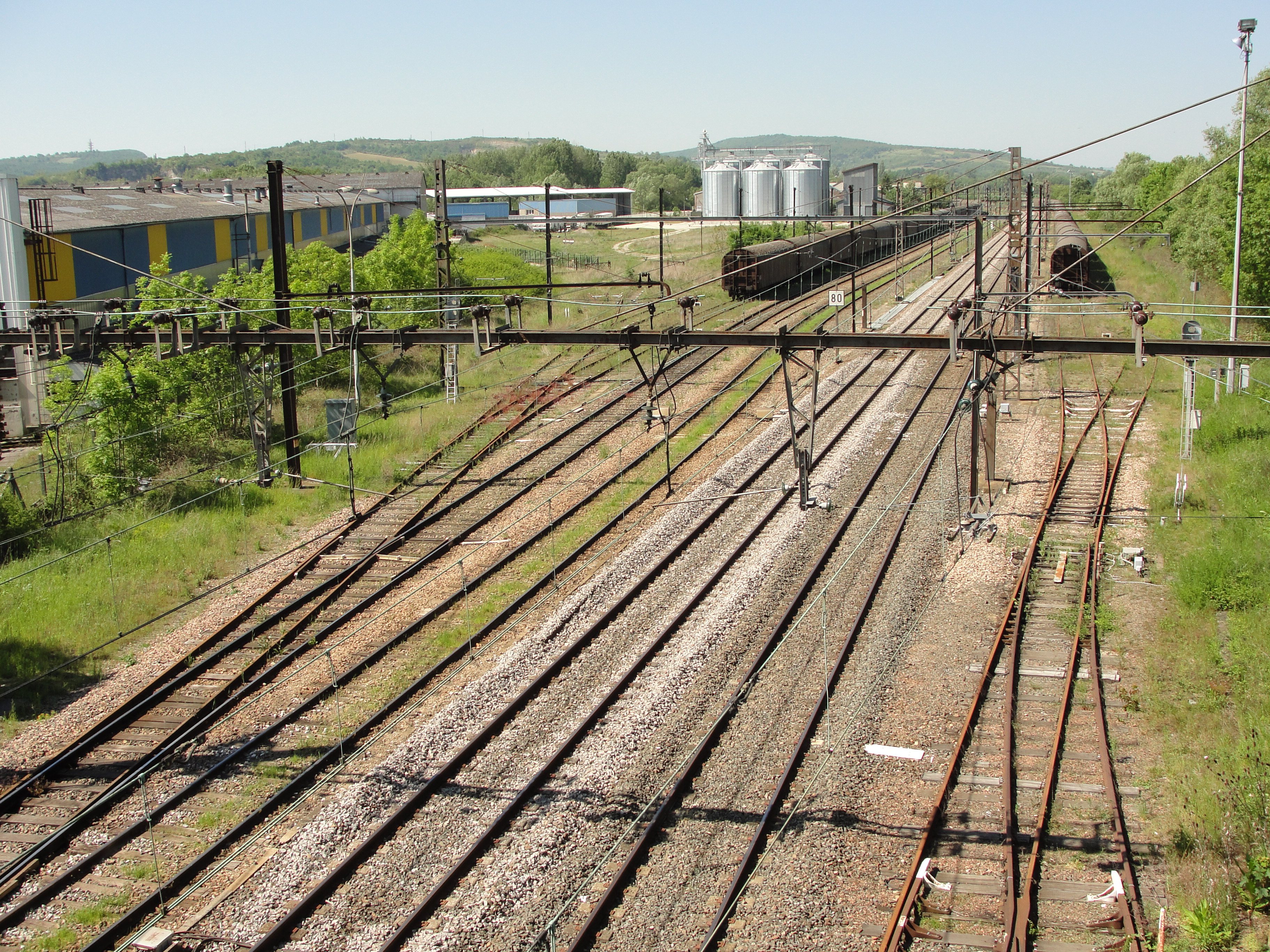 Bifurcation de Chagny (Saône-et-Loire) - le triage des Creusottes.